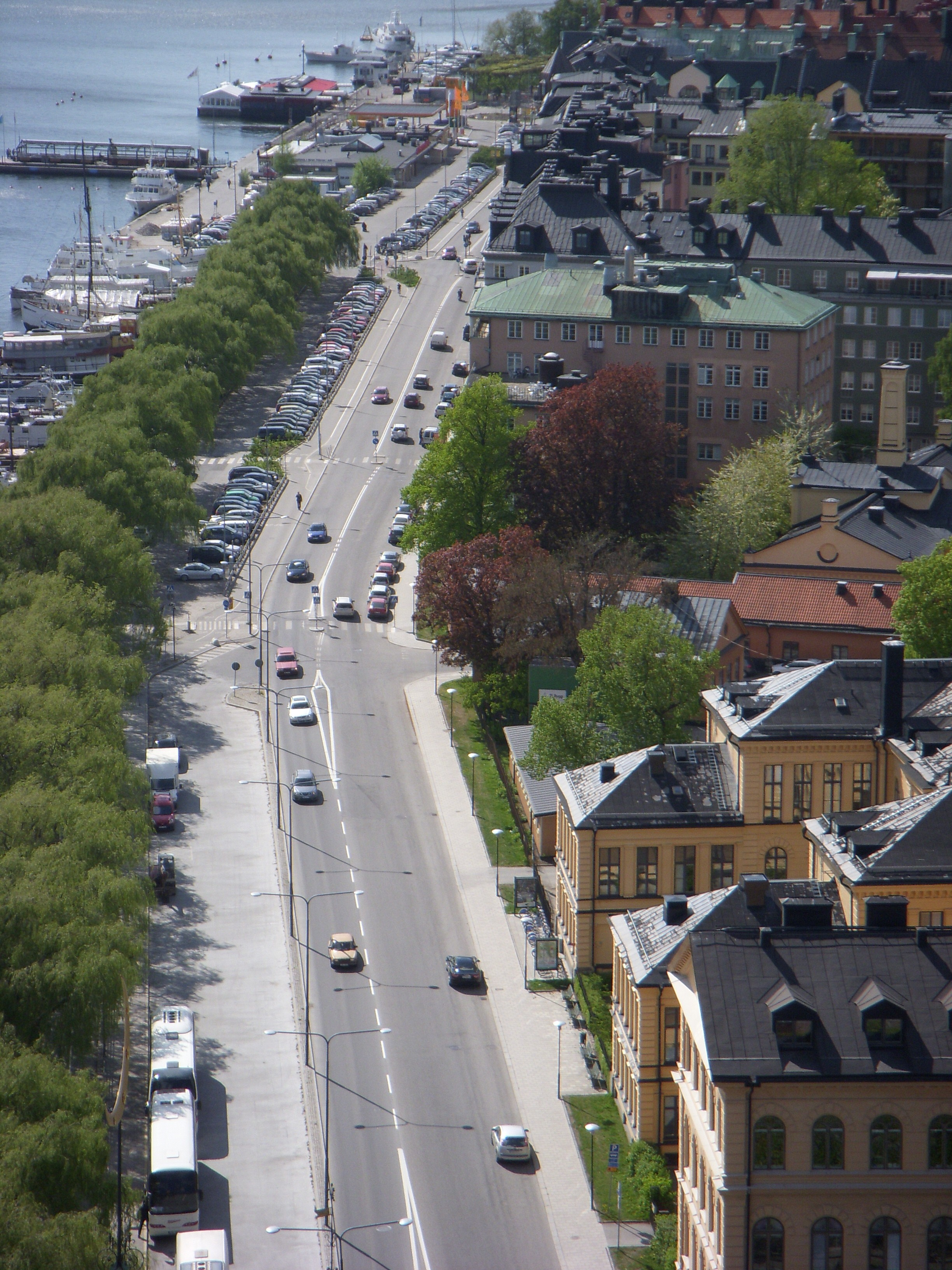 Norr Mälarstrand från Stockholms stadshusets torn